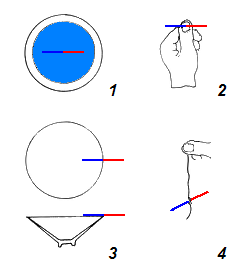 宋朝文献中记载指南针的四种使用方法示图。